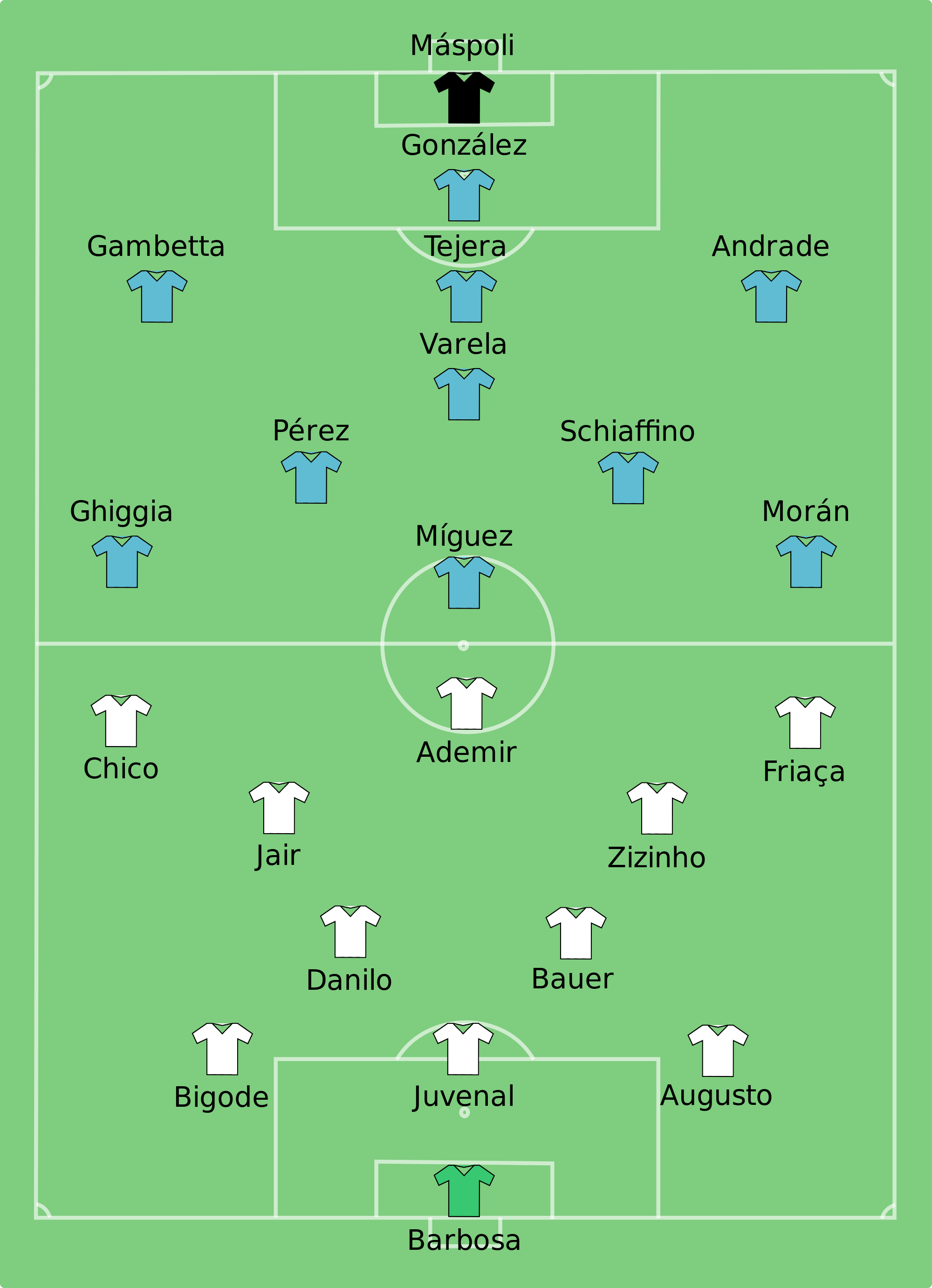 La Final